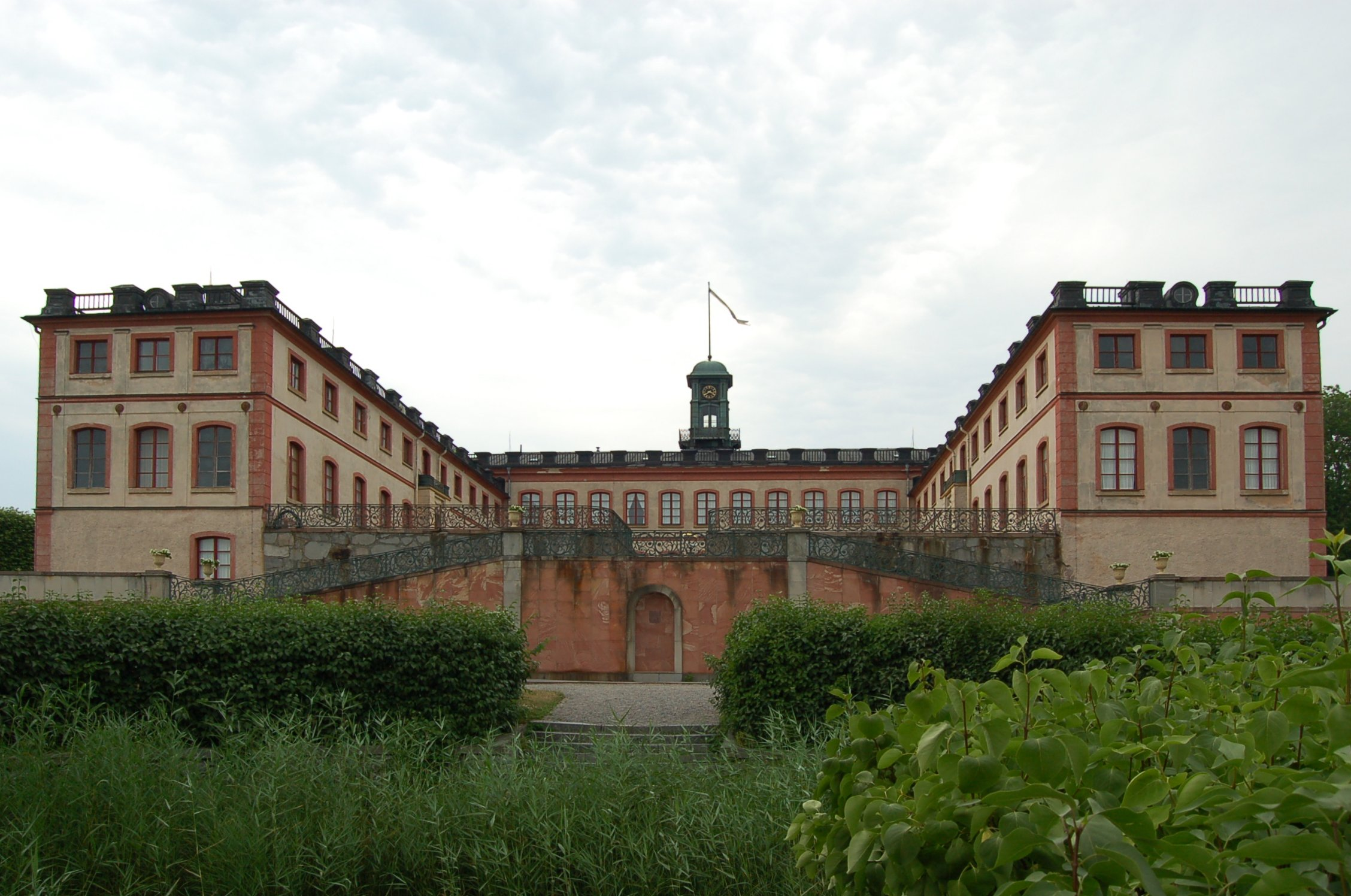 Sjösida av Tullgarns slott.